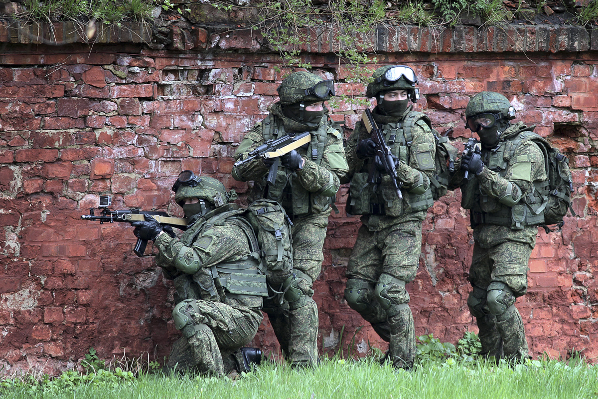 Тренировка 313-го отряда специального назначения борьбы с подводными диверсионными силами и средствами Балтийской военно-морской базы.